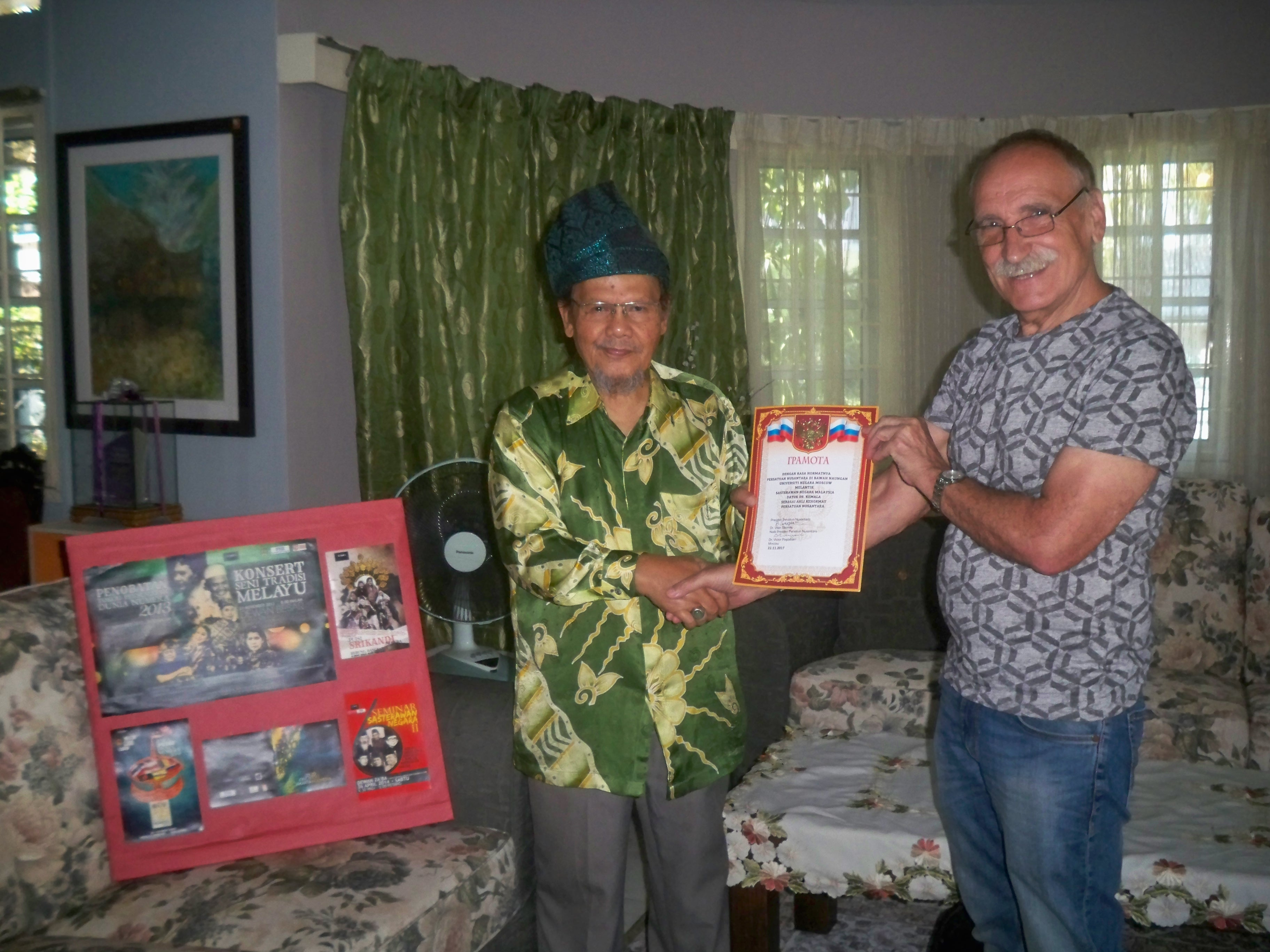 Timbalan Presiden Persatuan Nusantara Rusia Prof. Madya Dr. Victor Pogadaev menyampaikan surat tentang pelantikan Kemala sebagai Ahli Kehormat Persatuan Nysantara. Kuala Lumpur, 19.12.2017